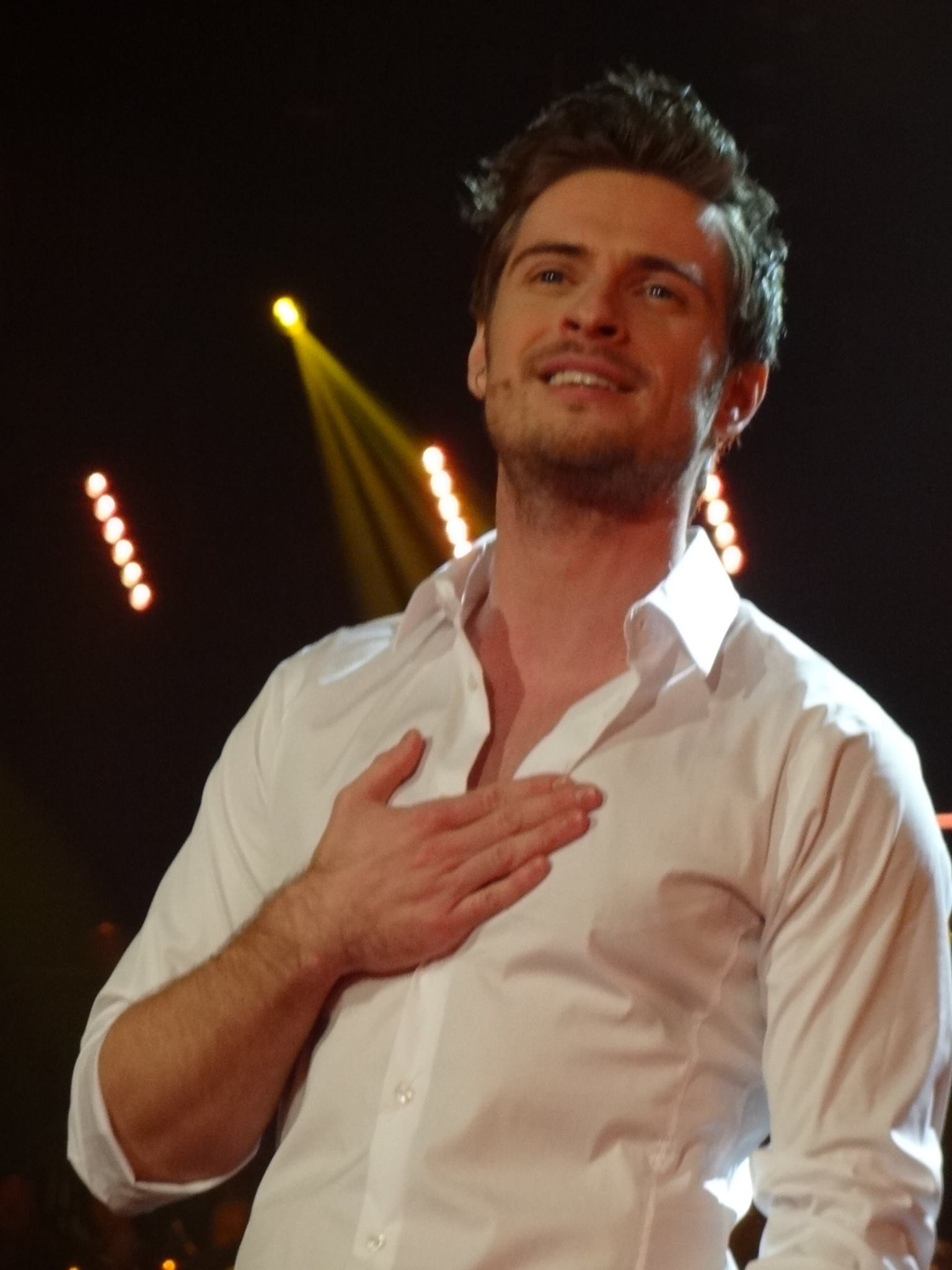 Jörn Schlönvoigt bei Florian Silbereisens Show "Die Besten im Frühling"